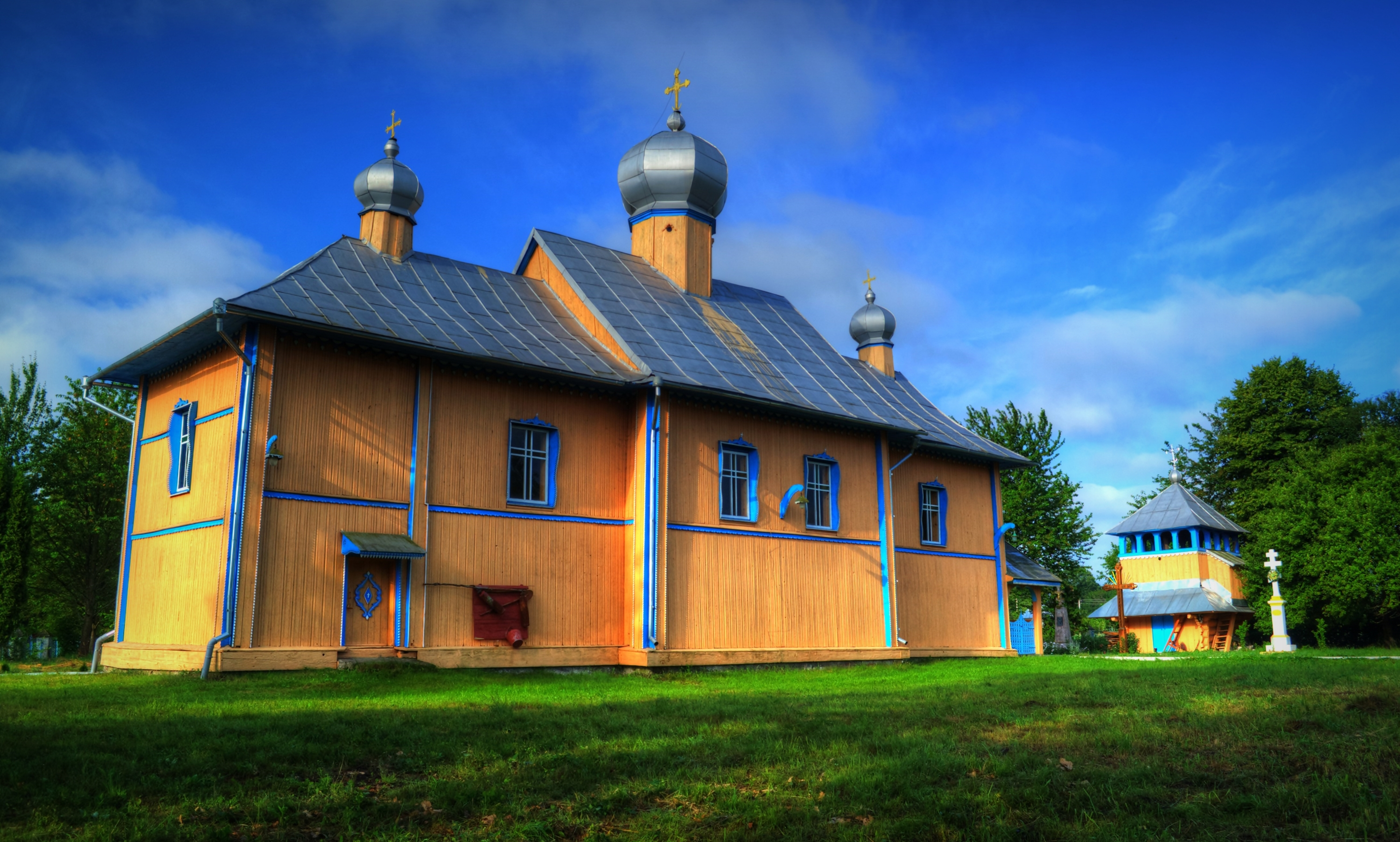 Дерев'янна церква в селі Дубравка